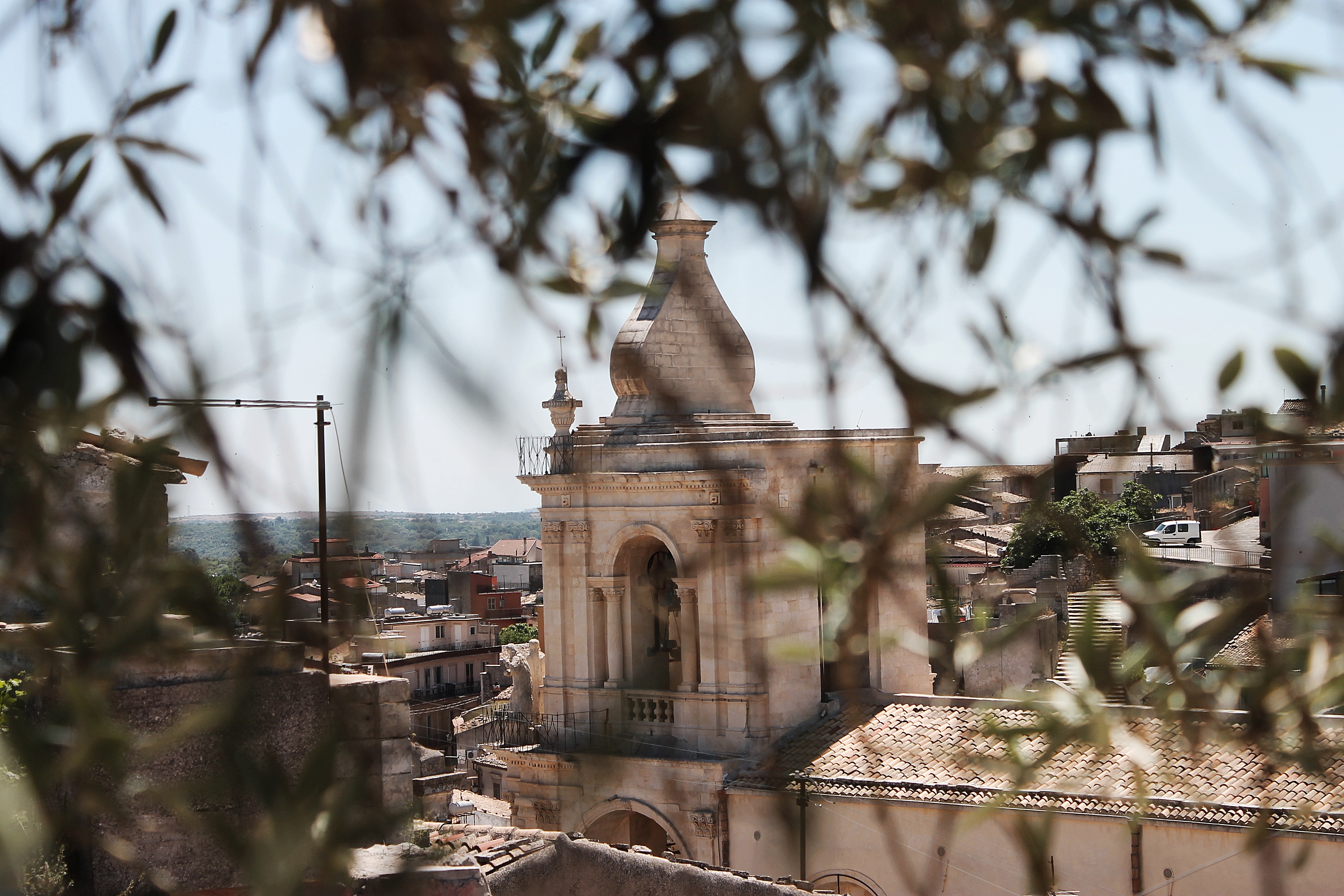 quartiere medievale di Palazzolo Acreide This is a photo of a monument which is part of cultural heritage of Italy.